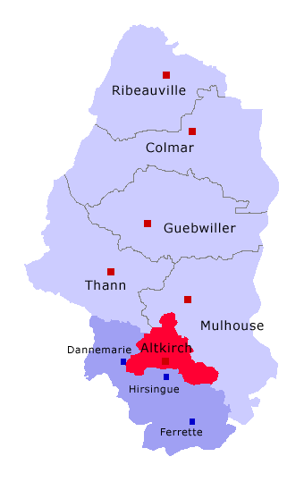 Lage von Kanton Altkirch im Arrondissement Altkirch und im Département Haut-Rhin Mai 2006